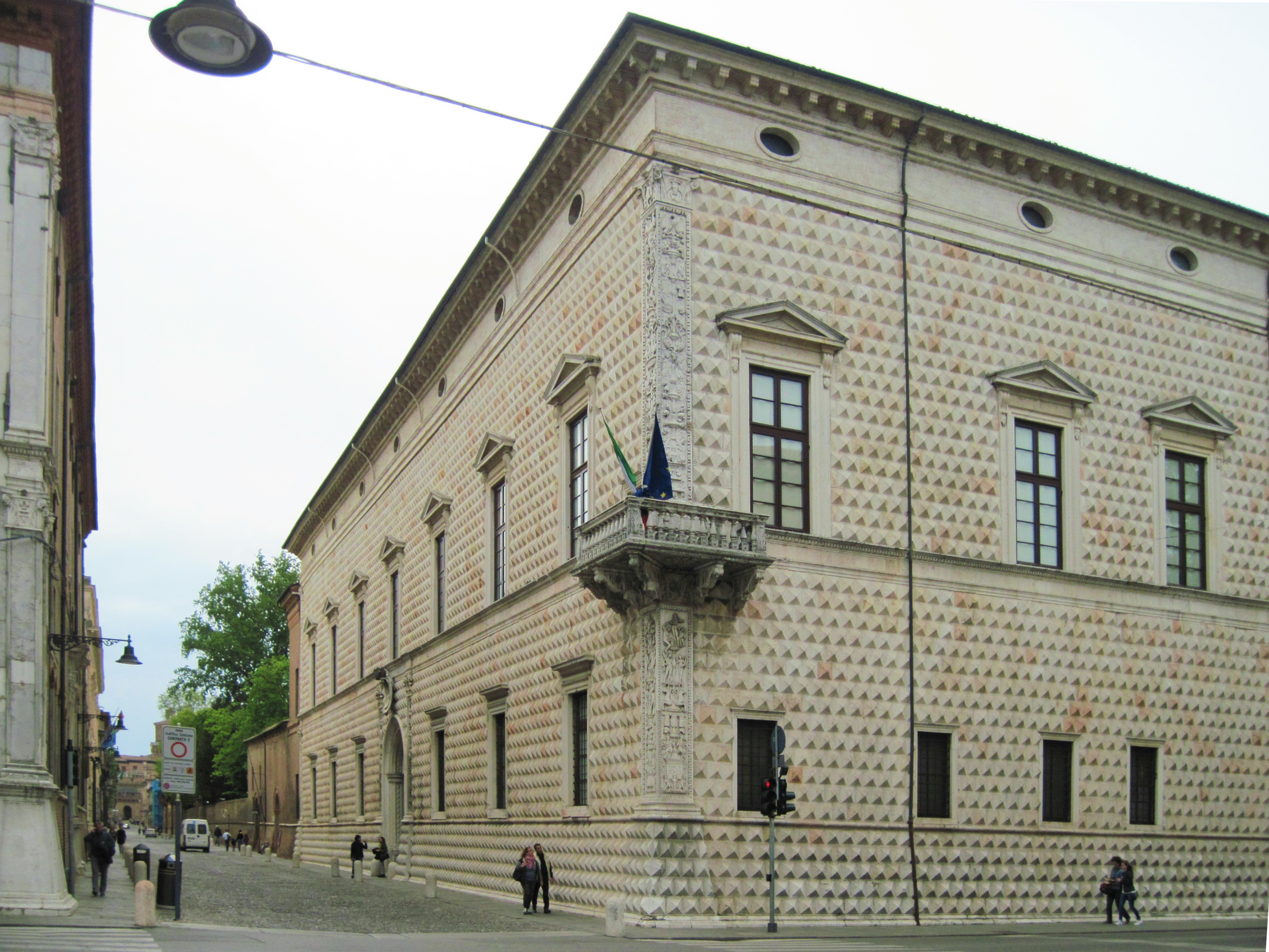 Facciate esterne, sul quadrivio degli Angeli